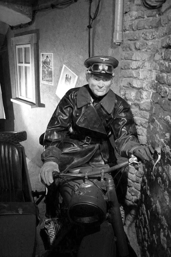 Katowice, Muzeum Hansa Klossa – Hans Kloss.